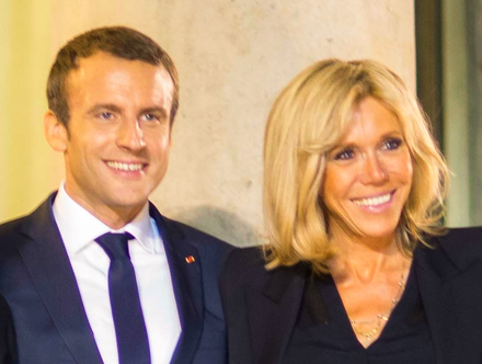 Visita de Trabajo a Francia